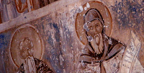 Стенопис в манастирската црква „Света Петка“ в битолското село Цапари.